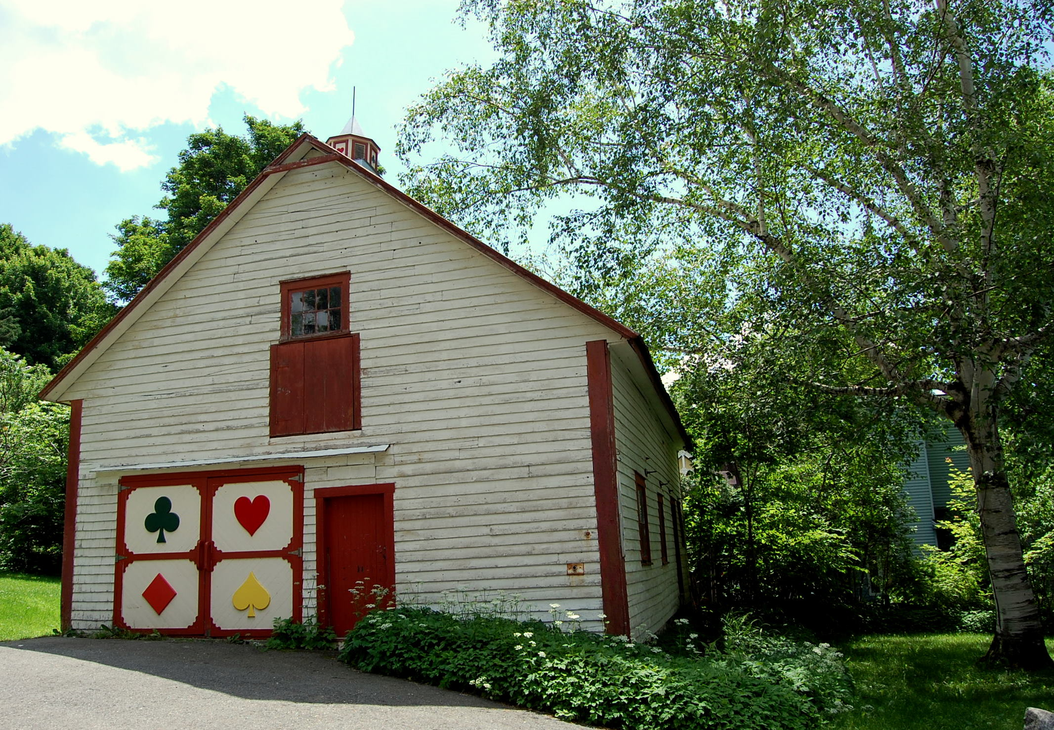 La Grange Fleury, est un pavillon du Musée Laurier de Victoriaville. On y présente à tous les étés du théâtre d'animation réalisé par deux étudiants et destiné au jeune public. Il est situé au 18, rue Laurier ouest, à Victoriaville